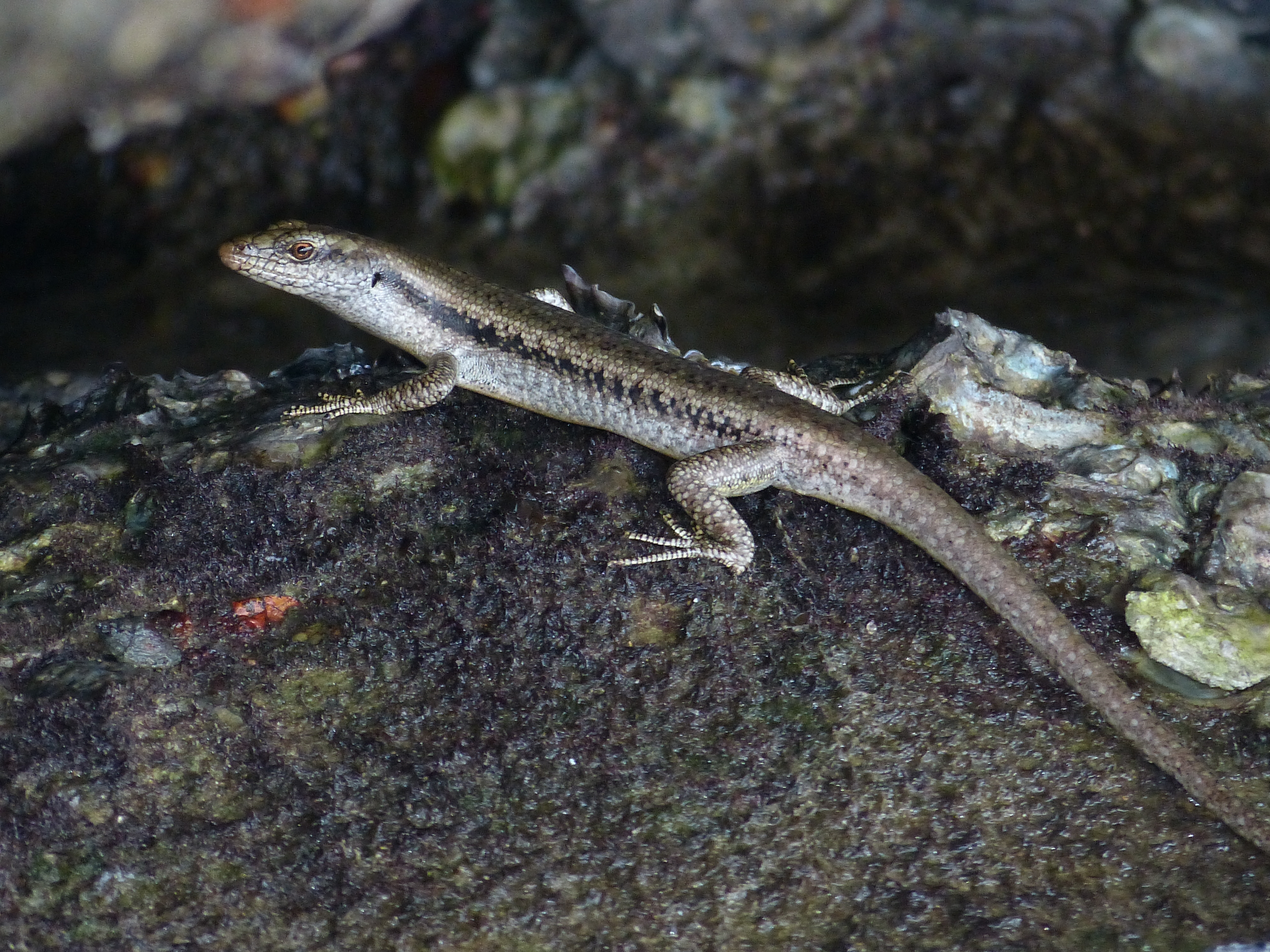 Bako NP, Sarawak, MALAYSIA